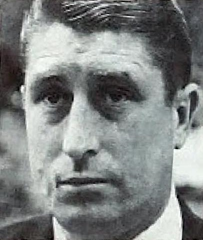 Jean Baratte, 'Football 79 - étoiles du passé', Panini figurina p.49.